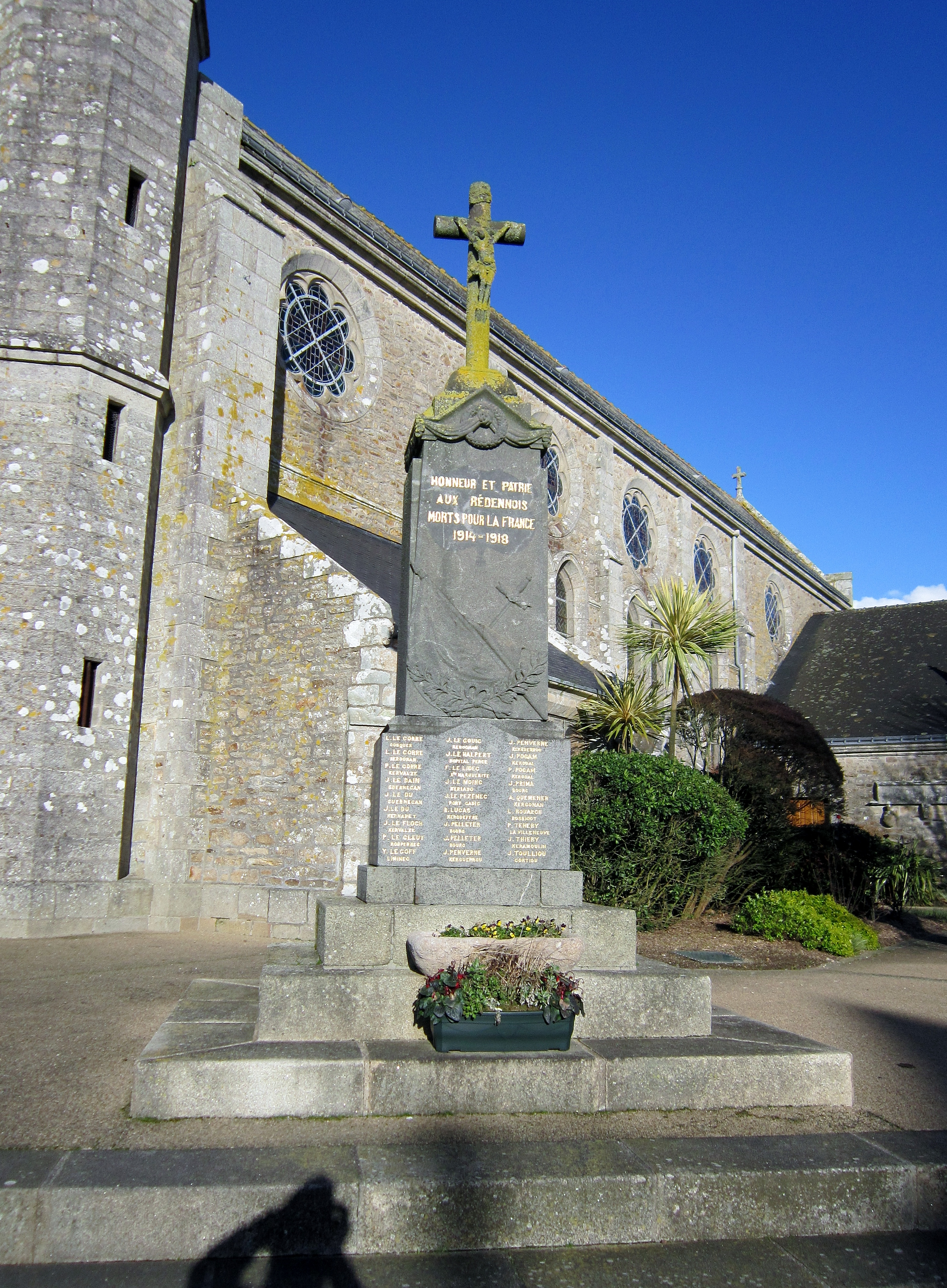 Rédené : le monument aux morts.